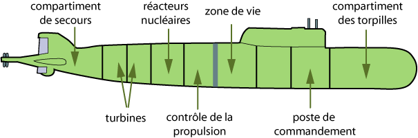 Description des compartiments du sous-marin Koursk Image réalisée par moi-même sous Adobe Illustrator Jean-Claude Duss 11 août 2005 à 16:09 (CEST)